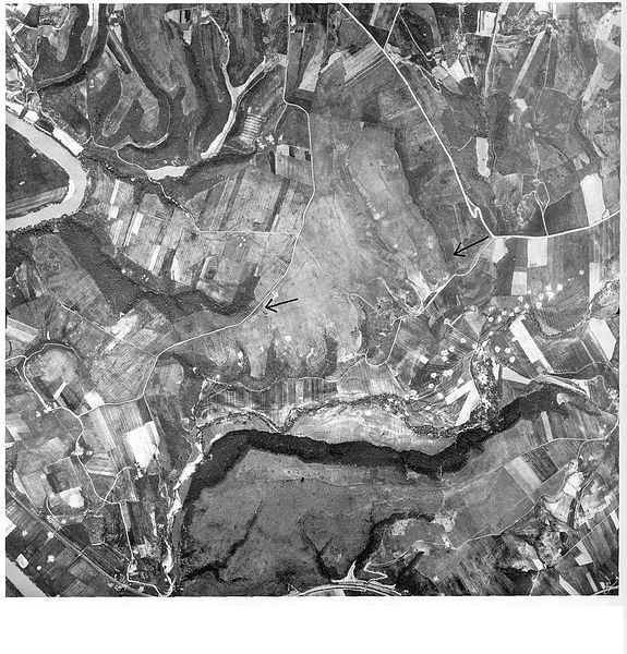 Viabilita' antica, bombardamento aereo RAF Grappignano, foto tratta da Flaminia Verga, Ager Foronovanus I Forma Italiae, vol. 44. 2006